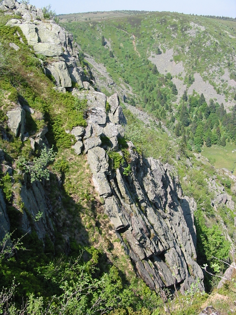 Versant alsacien du Gazon de Faîte Bord occidental du fossé rhénan. Sommet du massif des Vosges, France (1303 m). Photographie personnelle prise le 12 juin 2006. Copyright © Christian Amet